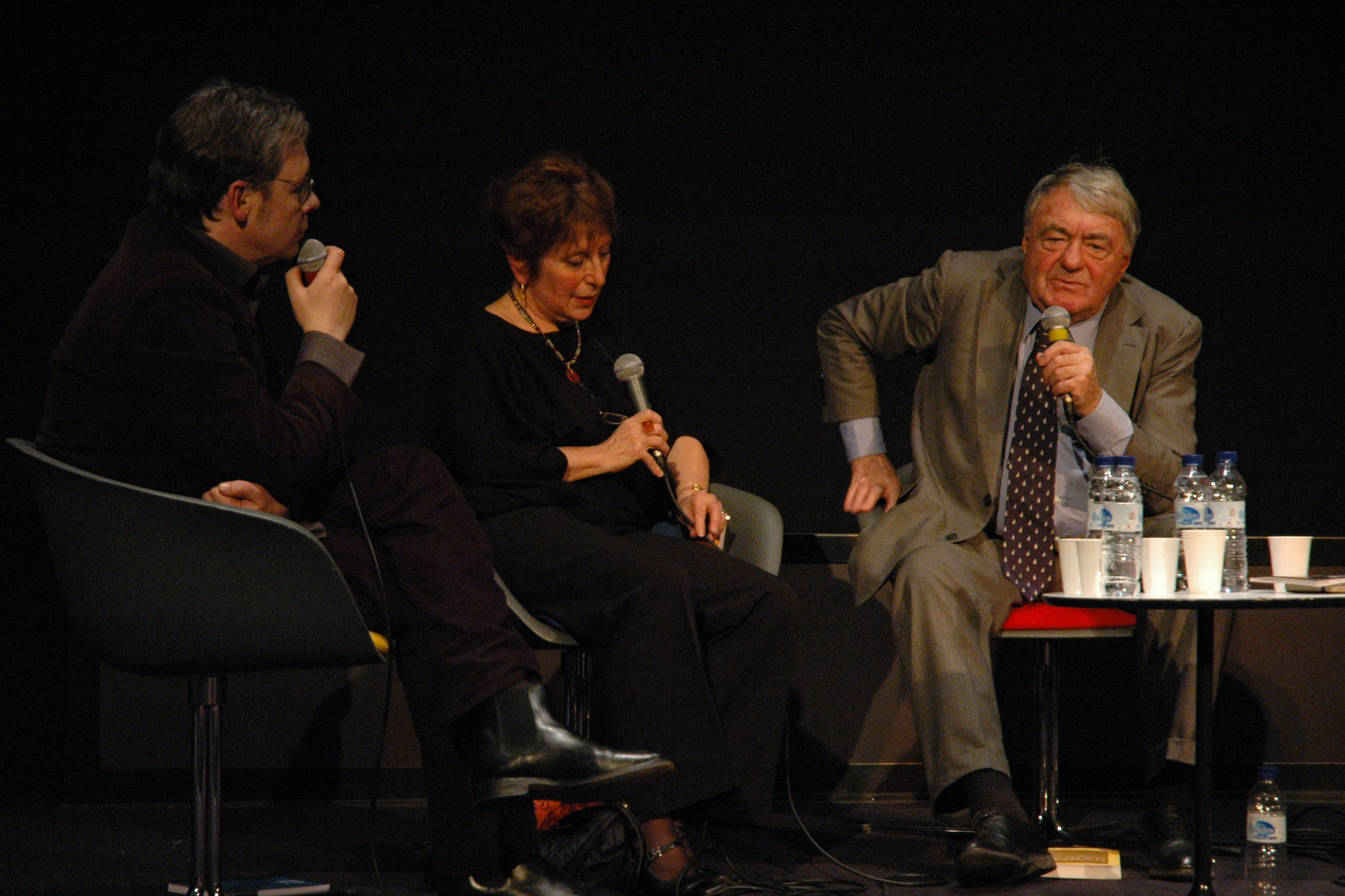 Jacques Mandelbaum & Marie-José Mondzain & Claude Lanzmann